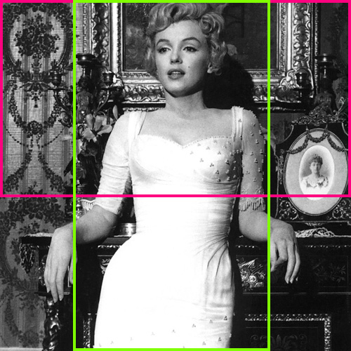 Démonstration de changement de cadrage après la rotation à 90° de l'appareil de prise de vues (ici au ratio 16:9 utilisé par des smartphones comme les iPhone 5 ou 6), sans modifier ni la focale ni la distance caméra/sujet. Document créé sur la base d'une image dans le domaine public (Wikimedia : Marilyn Monroe, The Prince and the Showgirl, 1.jpg)